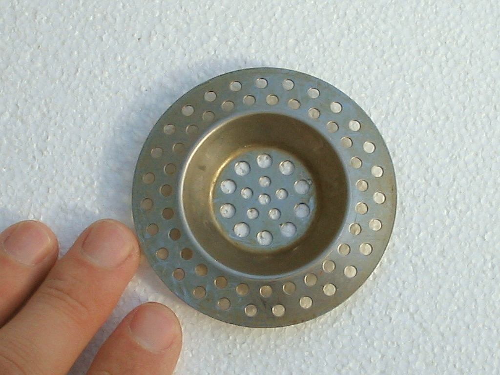 rooster voor de gootsteen